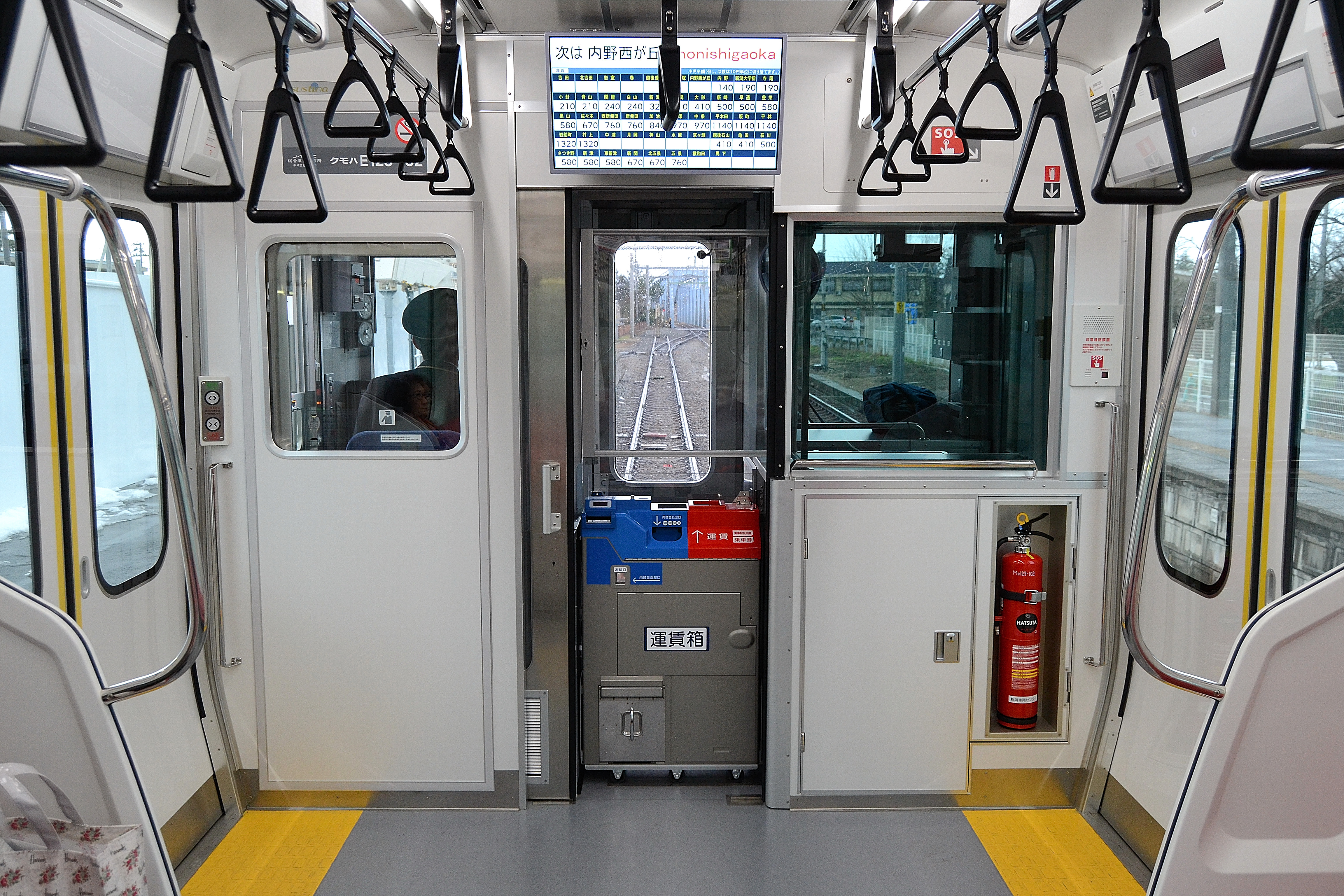 E129系の半室構造の運転室Nikon D3100